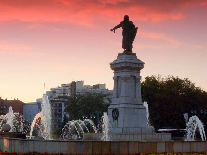 Estatua de Guzmán el Bueno